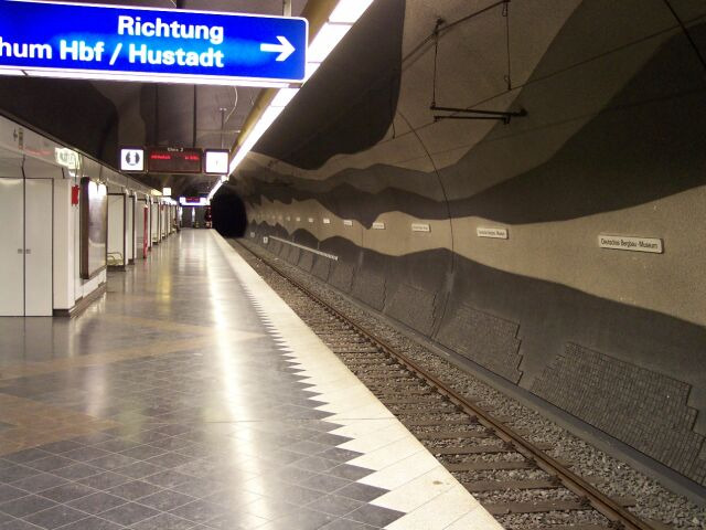 Bild aus Bochum, selbst aufgenommen, GFDL